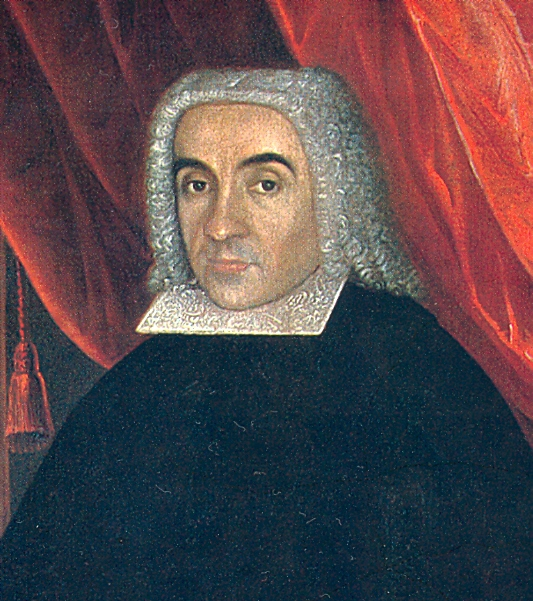 Dr. Diego Hurtado de Mendoza e Iturrizarra, rector de la Universidad de San Marcos